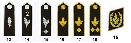 Rangabzeichen der Deutschen Hitlerjugend (DHJ) bis 1945: Offiziere 13 Bannführer (Oberst, OR-5c) 14 Oberbannführer Oberst, OF-5b) 15 Hauptbannführer (Oberst, OF-5a) Generale 16 Gebietsführer (Generalmajor, OF-6) 17 Obergebietsführer (Generalleutnant, OF-7) 18 Stabsführer der Reichsjugendführung (General der Waffengattung, OF-8) 19 Reichsjugendführer (Generalfeldmarschall, OF-10)